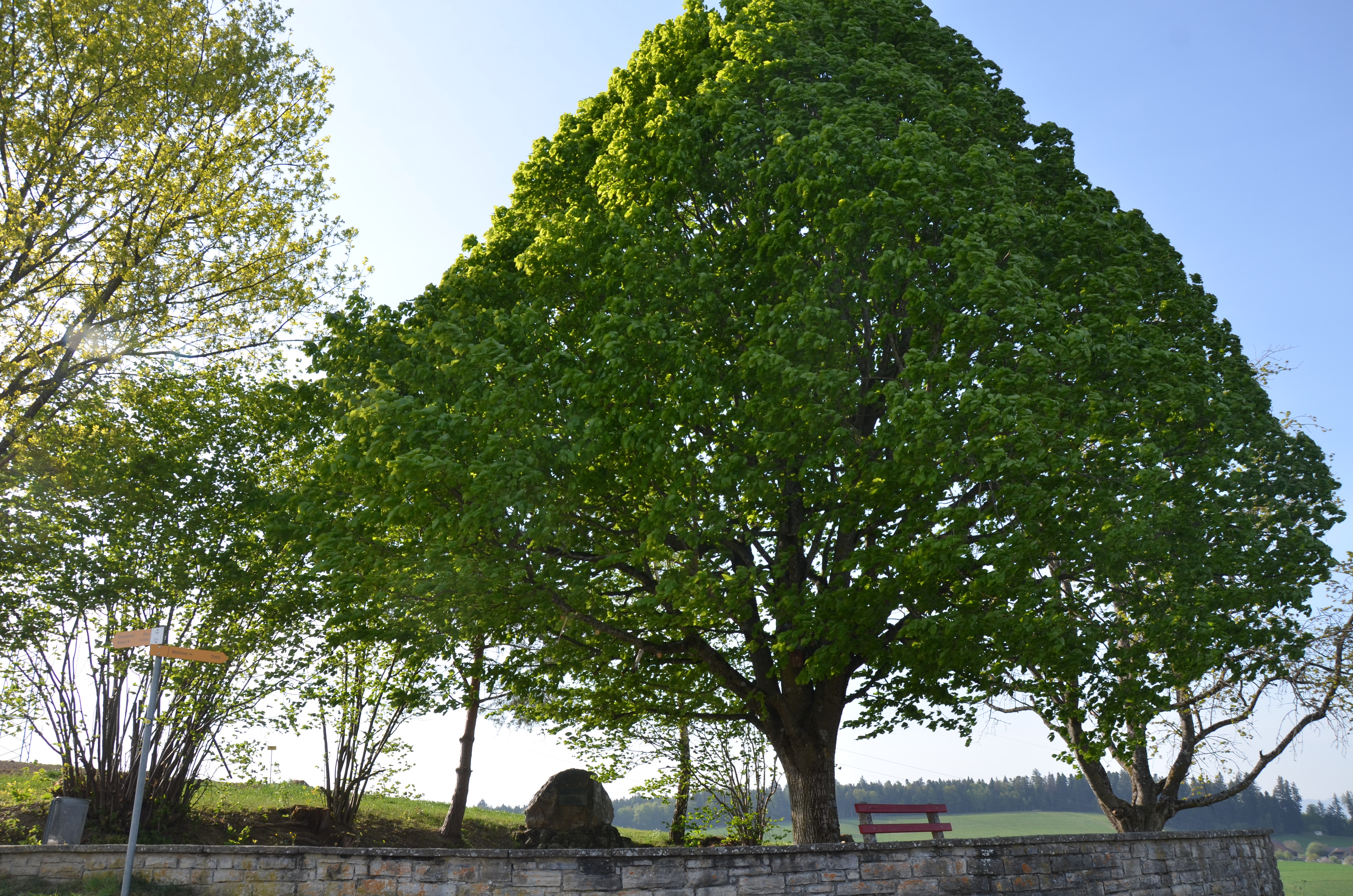 Denkmahl zur Güterzusammenlegung von 1944-1952 auf dem Guger.